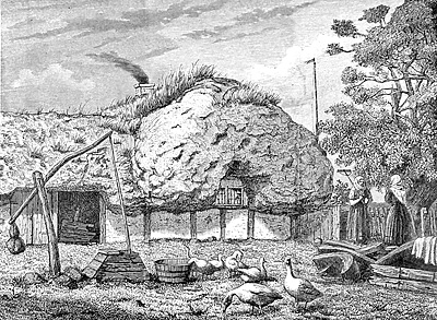 Et Hus paa Læsø.